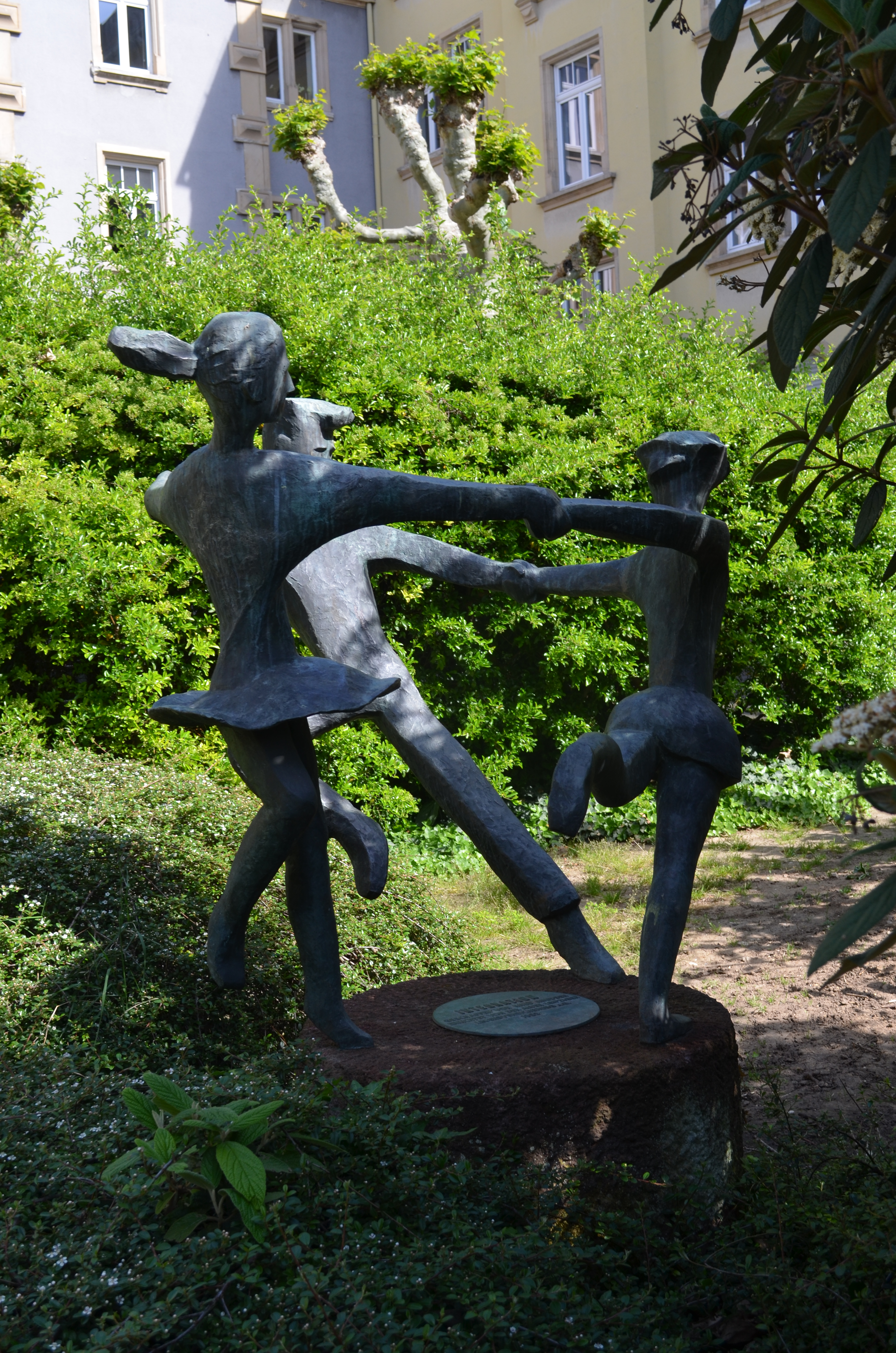 Frankfurt, Dorfelder Straße, Skulptur "Integration" von Knud Knudsen, 1988